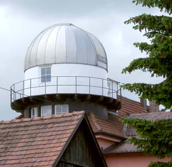 Sternwarte von Anton Kutter in Biberach an der Riß die früher mit dem Kutter-Schiefspiegler mit 30 cm Hauptspiegel ausgerüstet war - Observatory -. Selbst fotografiert von Benutzer:Enslin am 23.5.2004 in Biberach/Riß